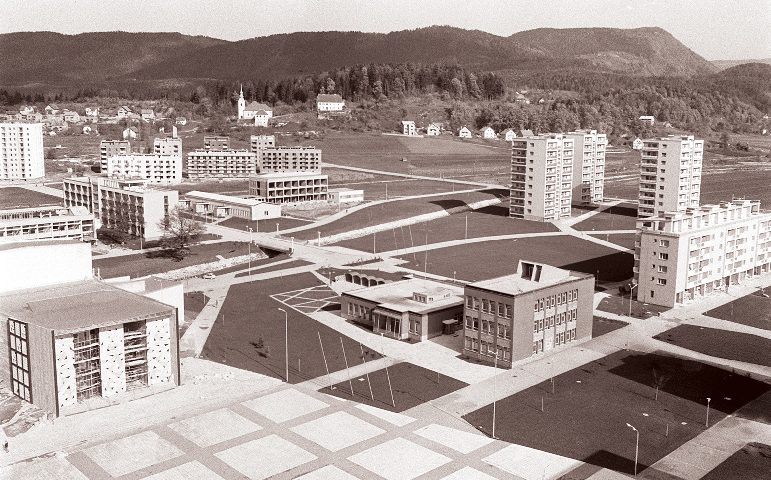 Rudarsko naselje Velenje